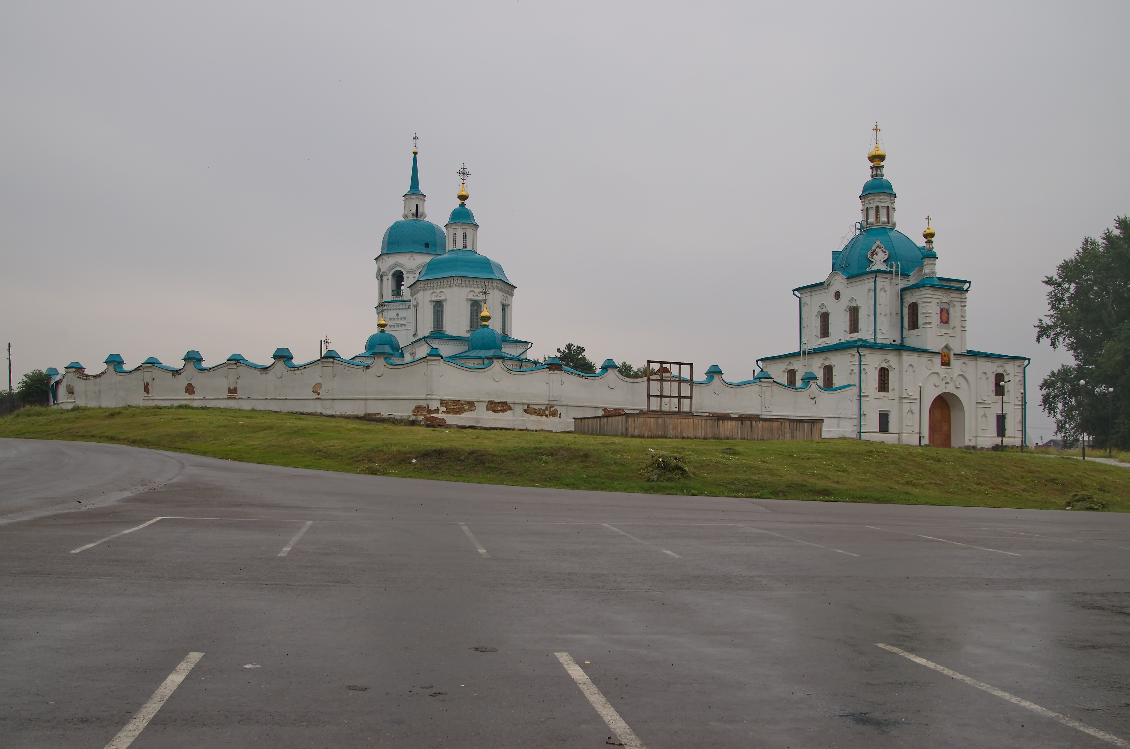 Монастырь Спасский: улица Рабоче-Крестьянская, 103, Енисейск, Красноярский край